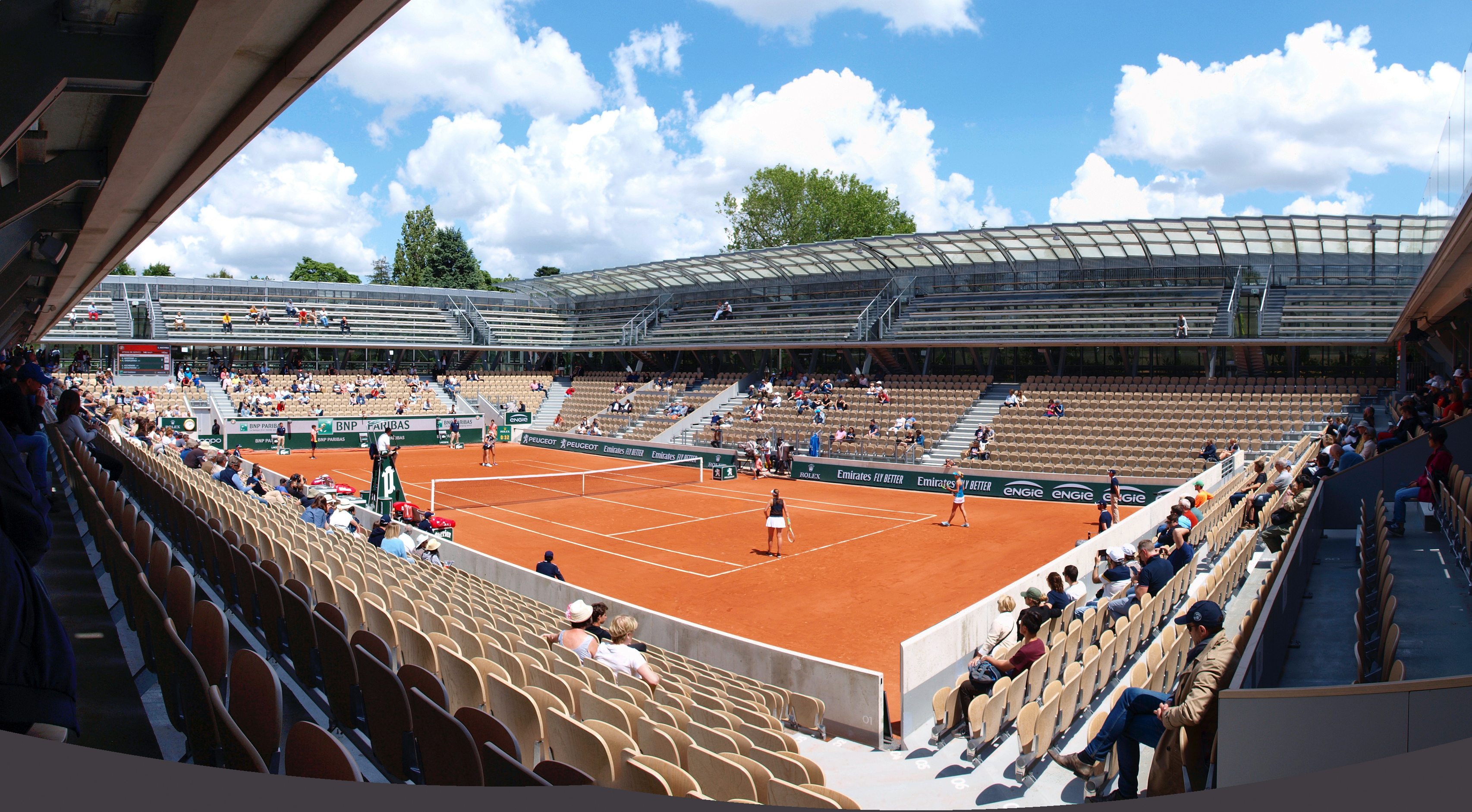 Internationaux de France de Tennis 2019, au stade Roland Garros de Paris (France), sur le nouveau court Simonne-Mathieu : Double dames entre E. Mertens & A. Sabalenka d'une part et L. Kichenok & J. Ostapenko d'autre part, le jeudi 6 juin 2019